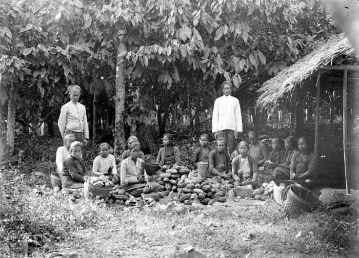 Negatief. Vrouwen slaan na de oogst cacaovruchten open op onderneming Getas, Midden-Java